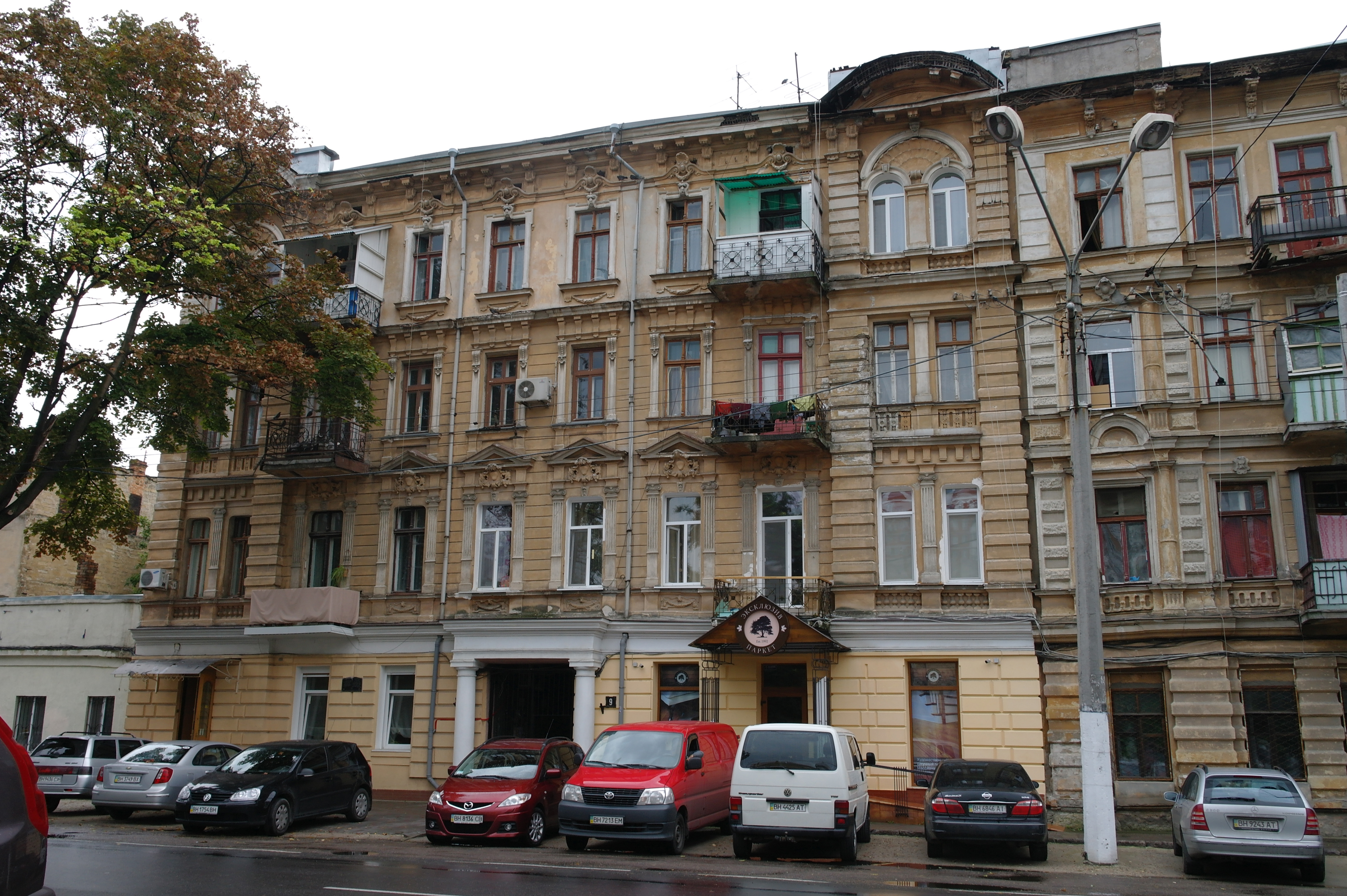 Одеса, Мала Арнаутська, 9